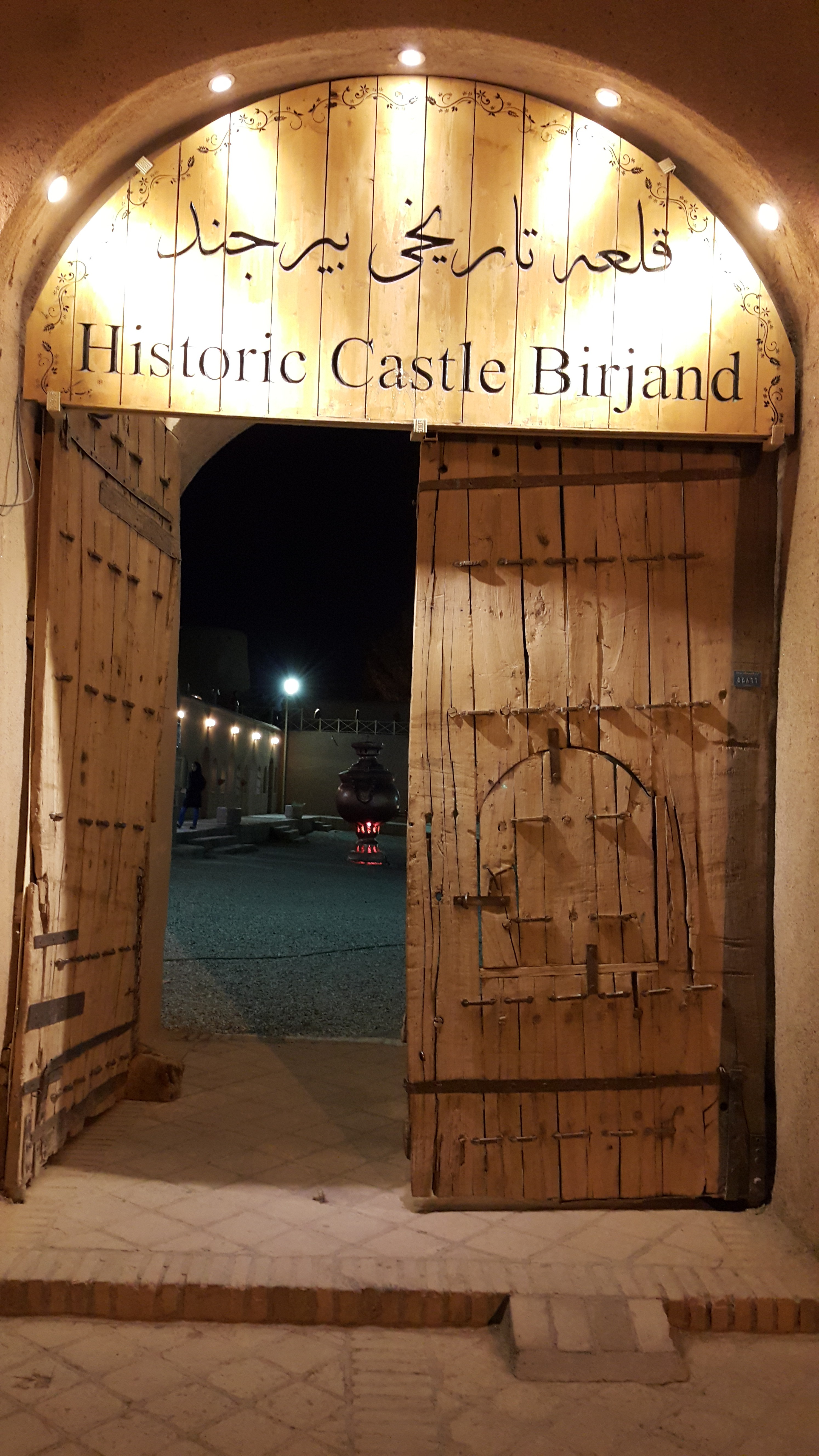 قلعه تاریخی بیرجند 08